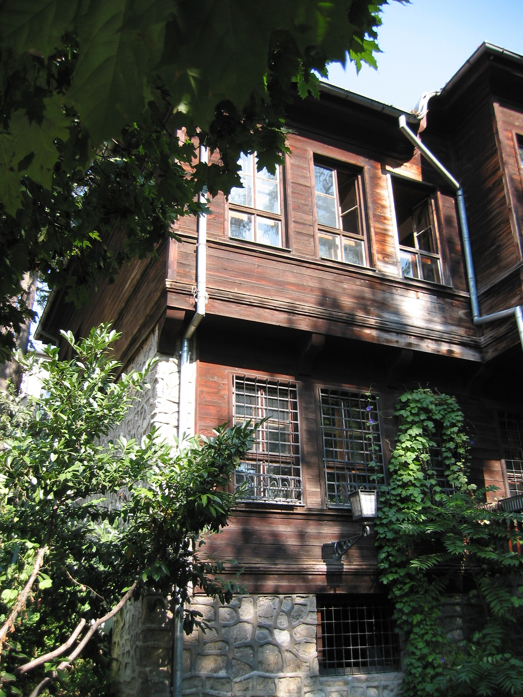 Varna, vieille façade. Photo prise par Harrieta171 le 29/09/04